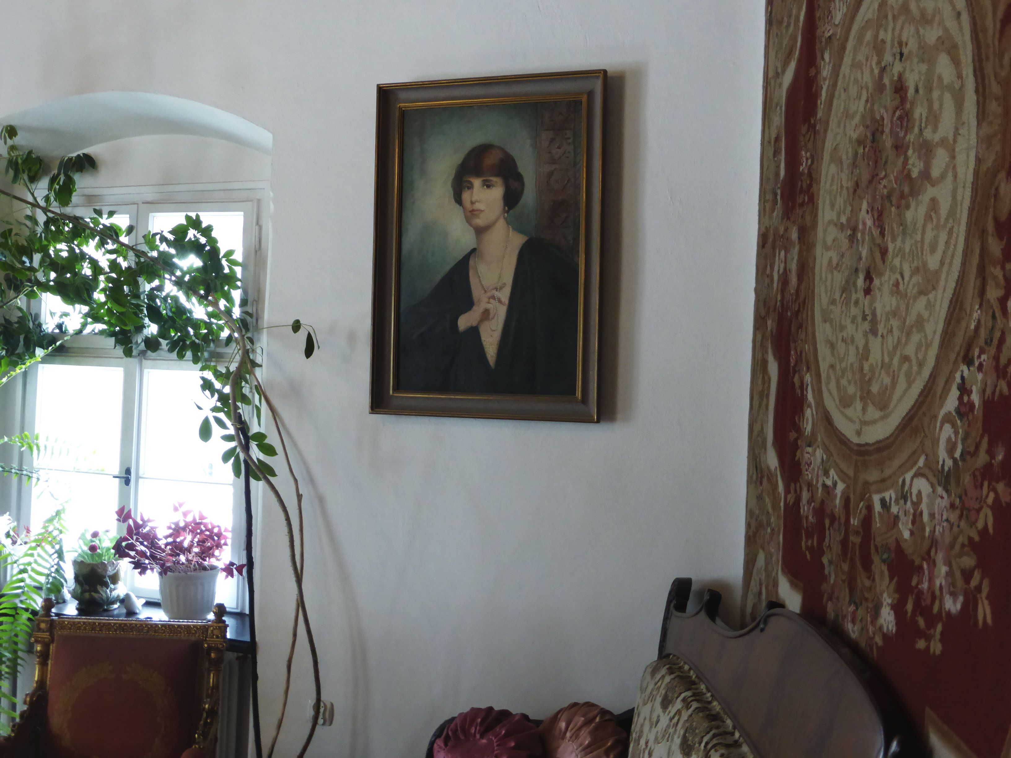 Niedzica Castle - Portrait der Gräfin Ilona Bethelen Salamon